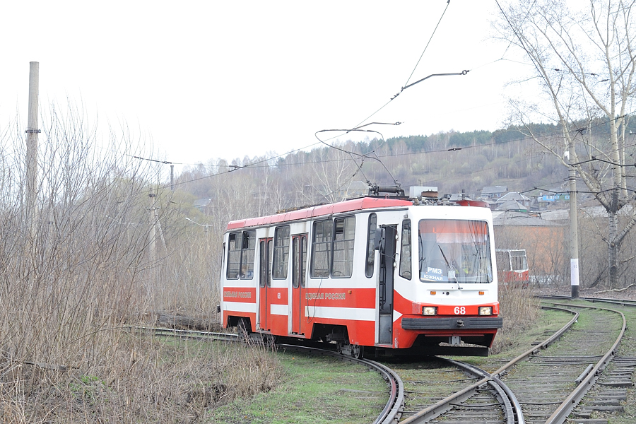 LM-99K 68 in Ossinniki